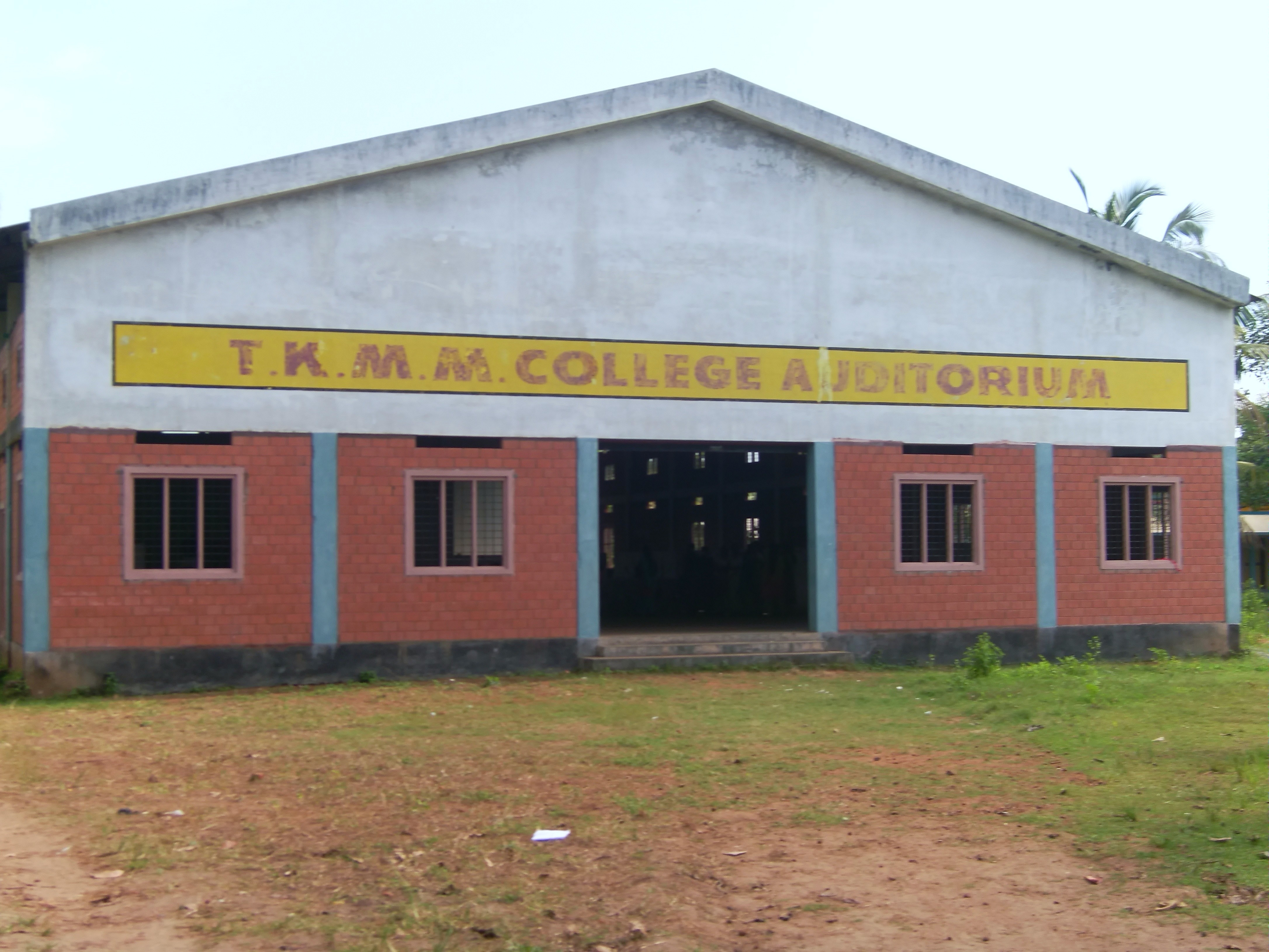 T.K.Madhava Memorial College auditorium